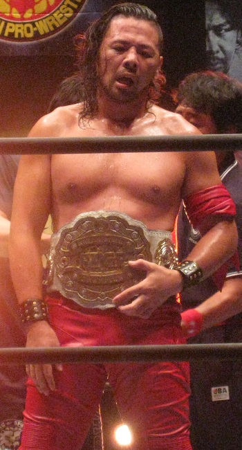 2014年9月21日 神戸ワールド記念ホール 「DESTRUCTION in KOBE」 IWGPインターコンチネンタル王座を腰に巻く中邑真輔